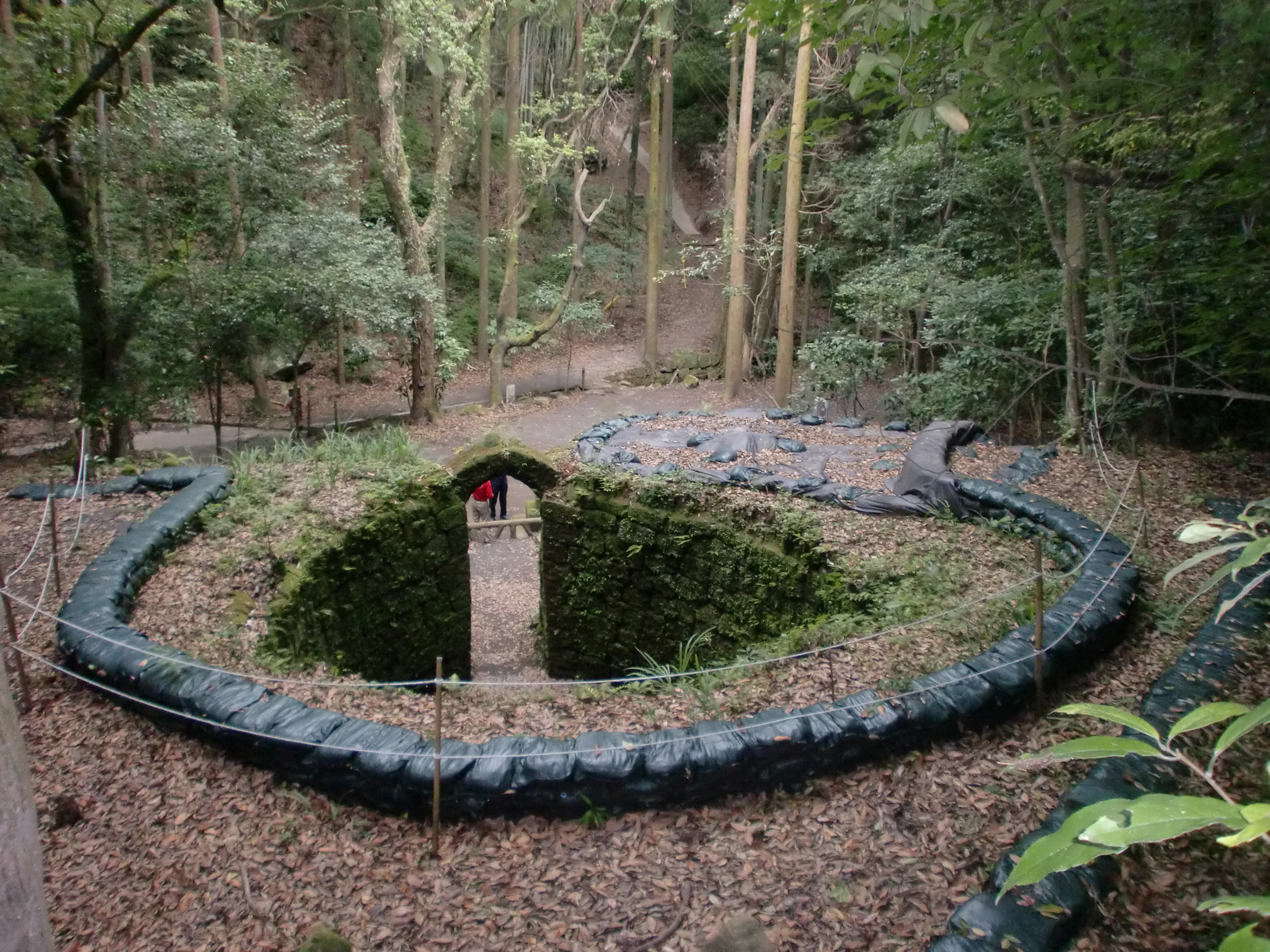 世界文化遺産を構成する資産の一つ「寺山炭窯跡」を後の丘（立入り可能エリア）から撮影